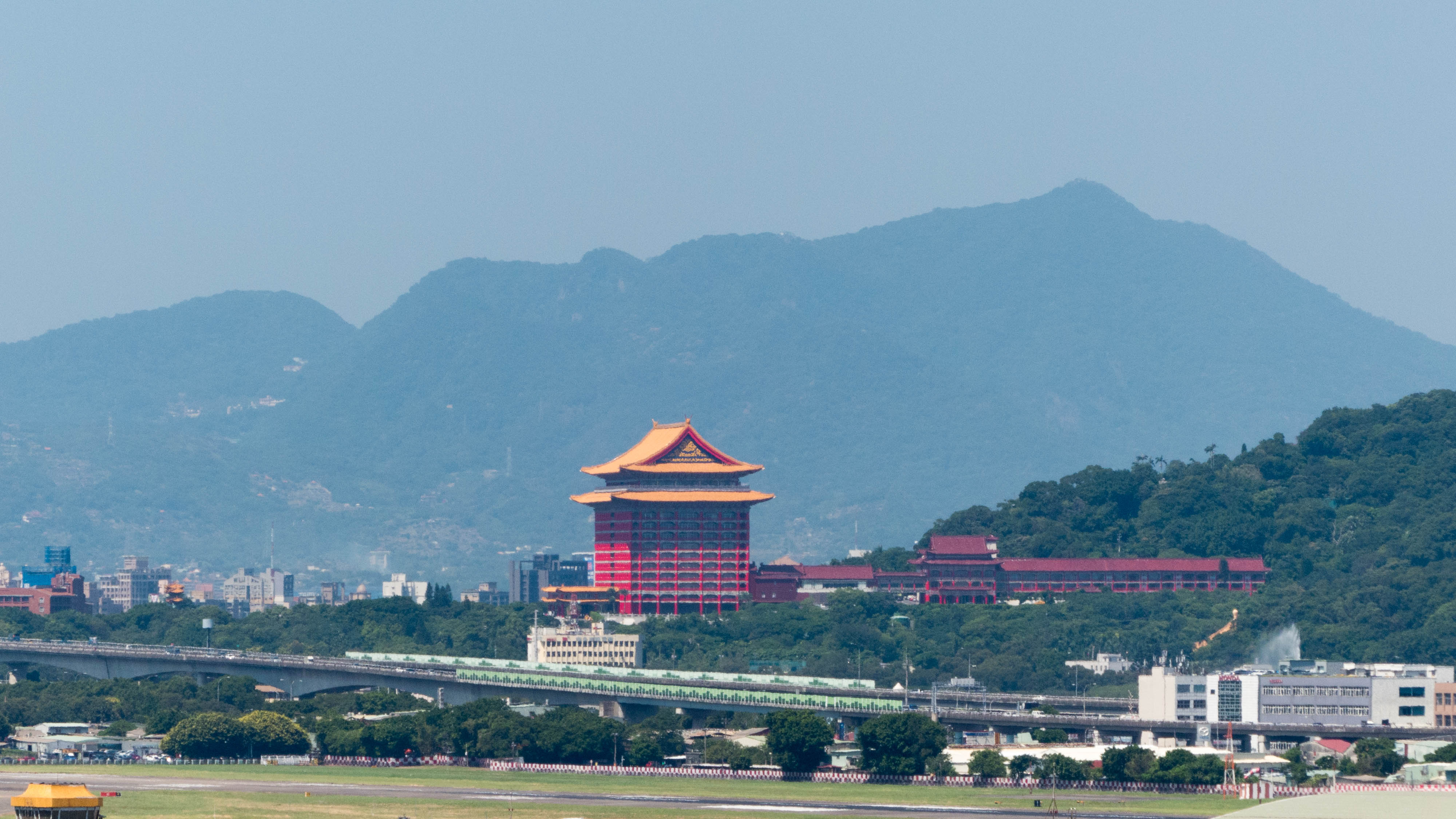 從民生社區活動中心10樓西北遠眺臺北圓山大飯店全景，遠方是觀音山。